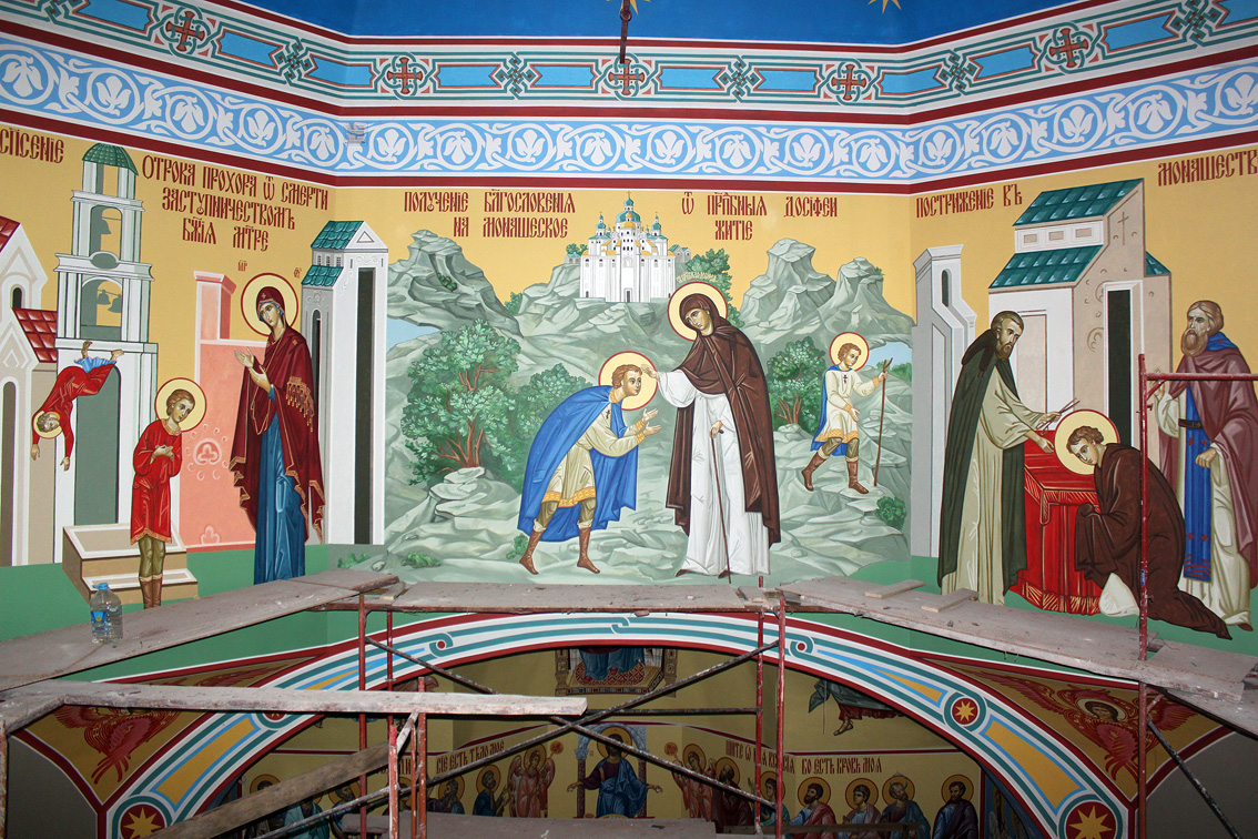 Жития Серафима Саровского. Роспись храма прп.Серафима Саровского. Киев. Художники: Творческая мастерская Андреева